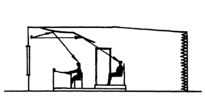 Sala Rettinger